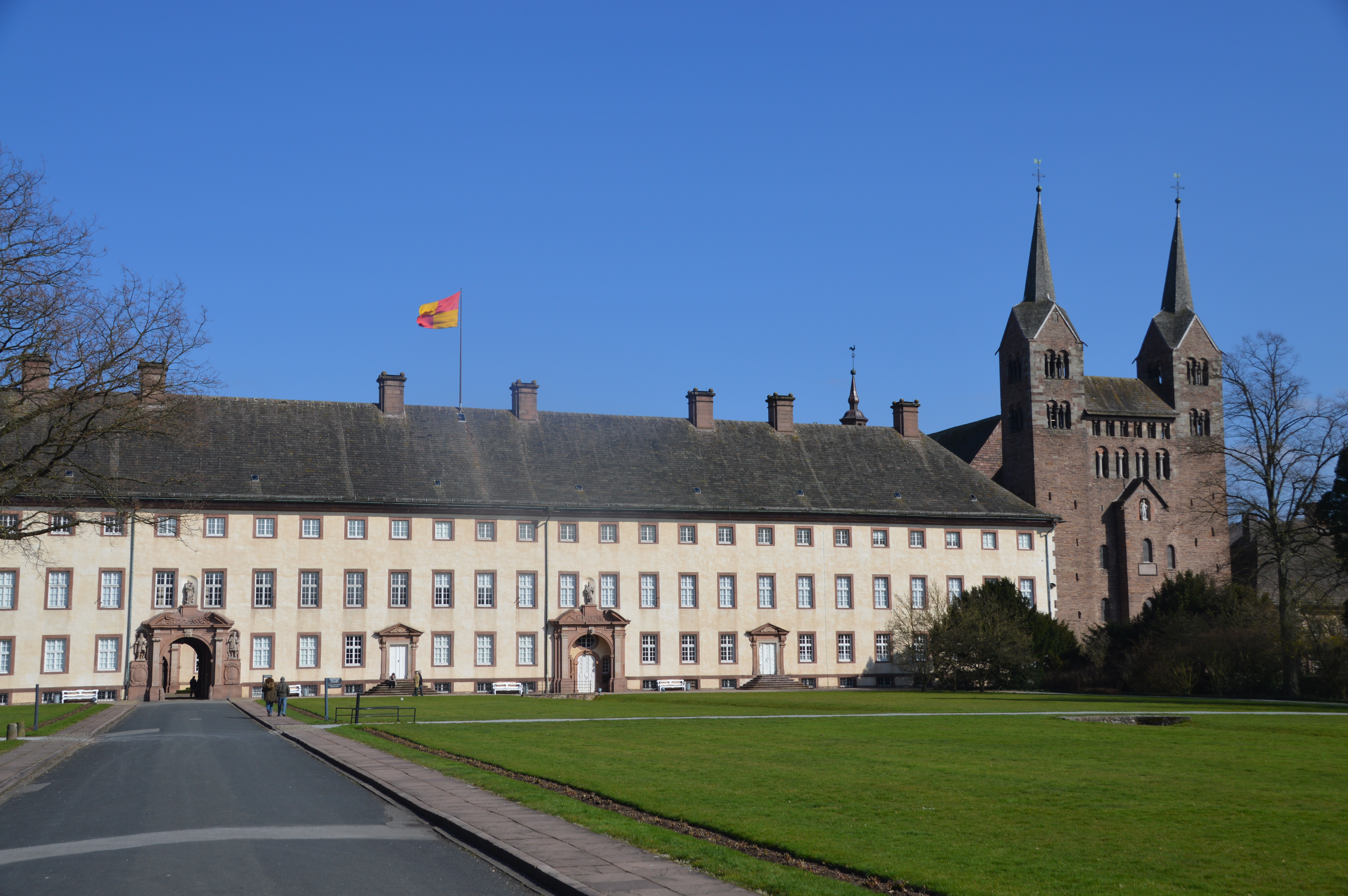 Dieses Foto zeigt Westwerk und Westfassade von Corvey.